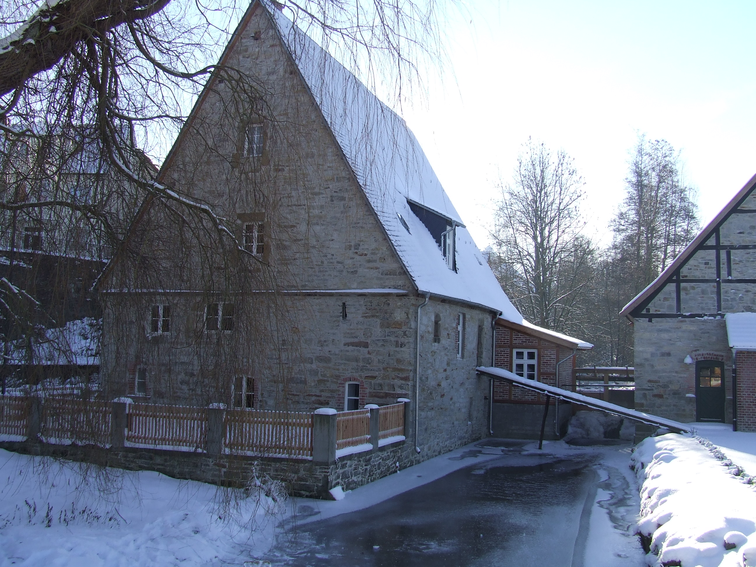 Die fertig renovierte Mittelmühle Büren tiefverschneit